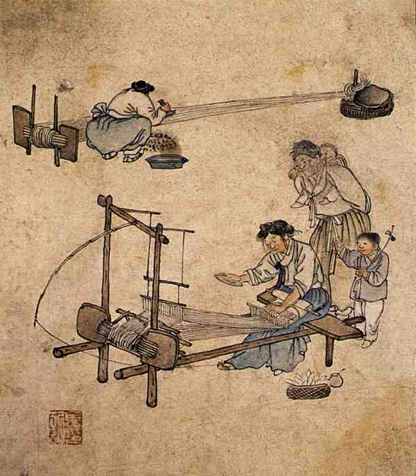 길쌈(織造), 단원풍속도첩(檀園風俗畵帖)에서 종이에담채, 27cm x 22.7cm, 국립 중앙박물관 소장